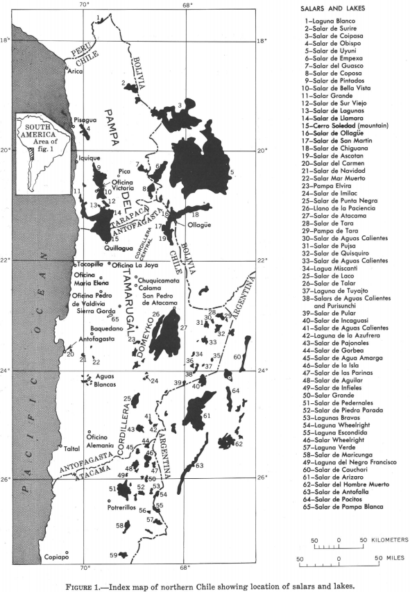 Salas O., Raúl; Eriksen, George E.; "Geology and resources of salars in the central Andes", Estados Unidos de América, USGS, 1987, . With some little differences: (1974)